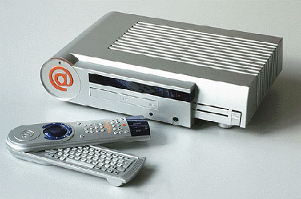 Metabox 1000 - Produkt der Metabox AG